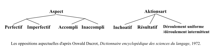 Les_oppositions_aspectuelles_d'après_Oswald_Ducrot